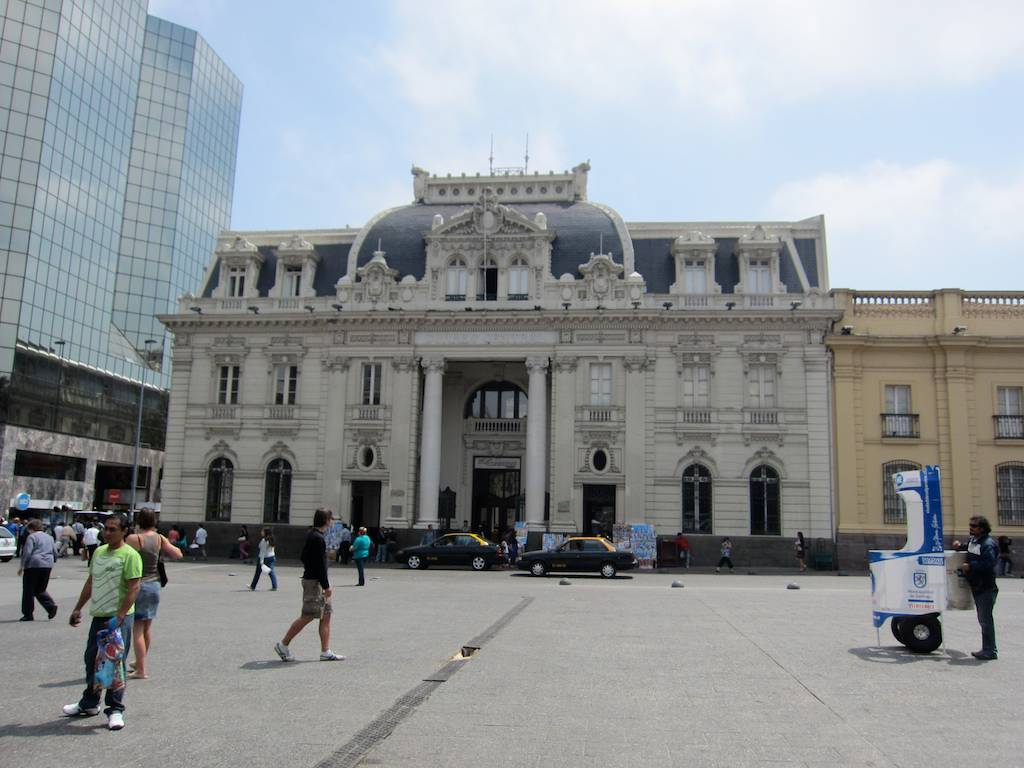 Correo Central de Santiago, Chile